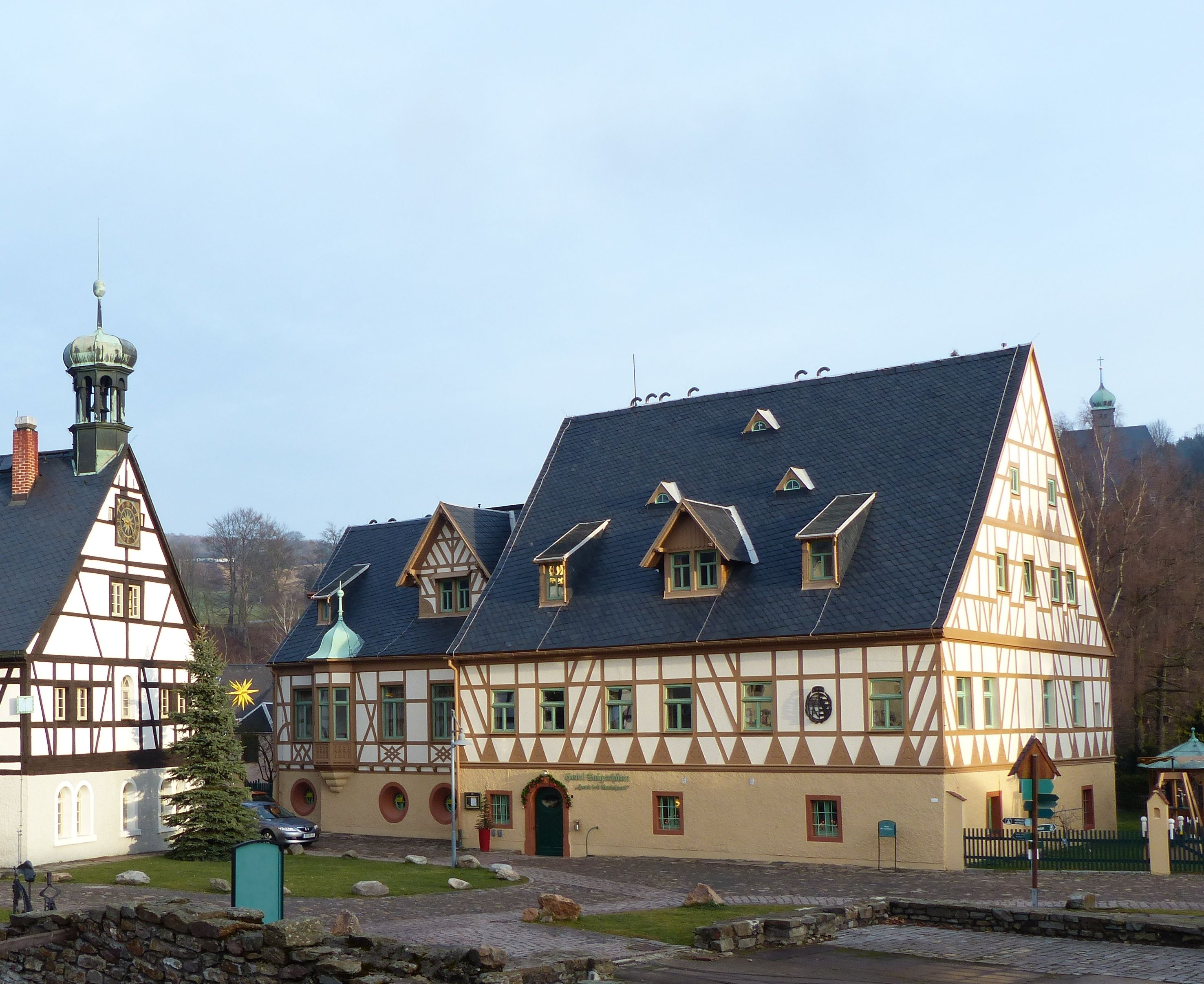 Saigerhütte Grünthal: Haus des Anrichters